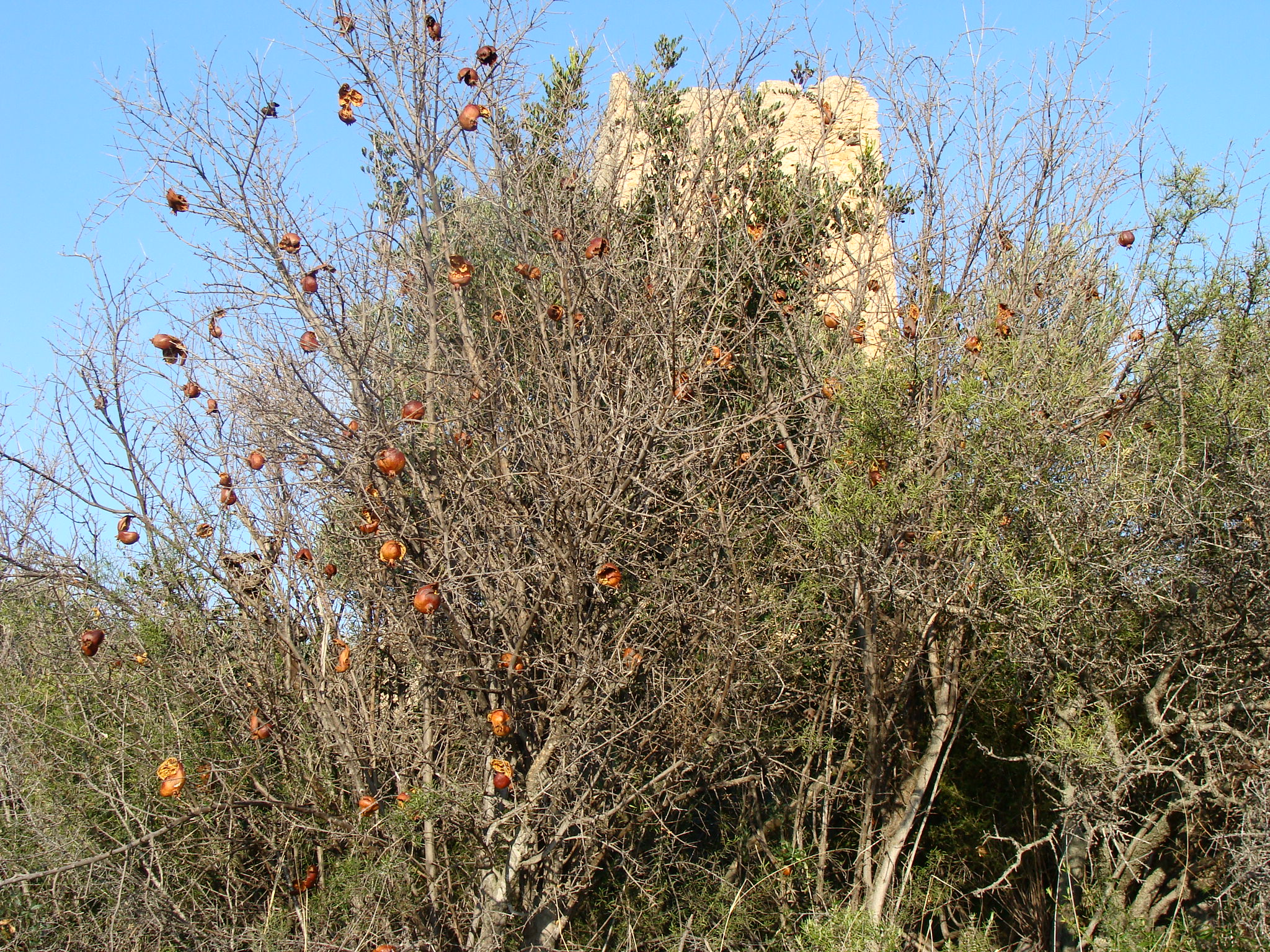 Granado próximo al castillo de Alédua (Llombay, Valencia)